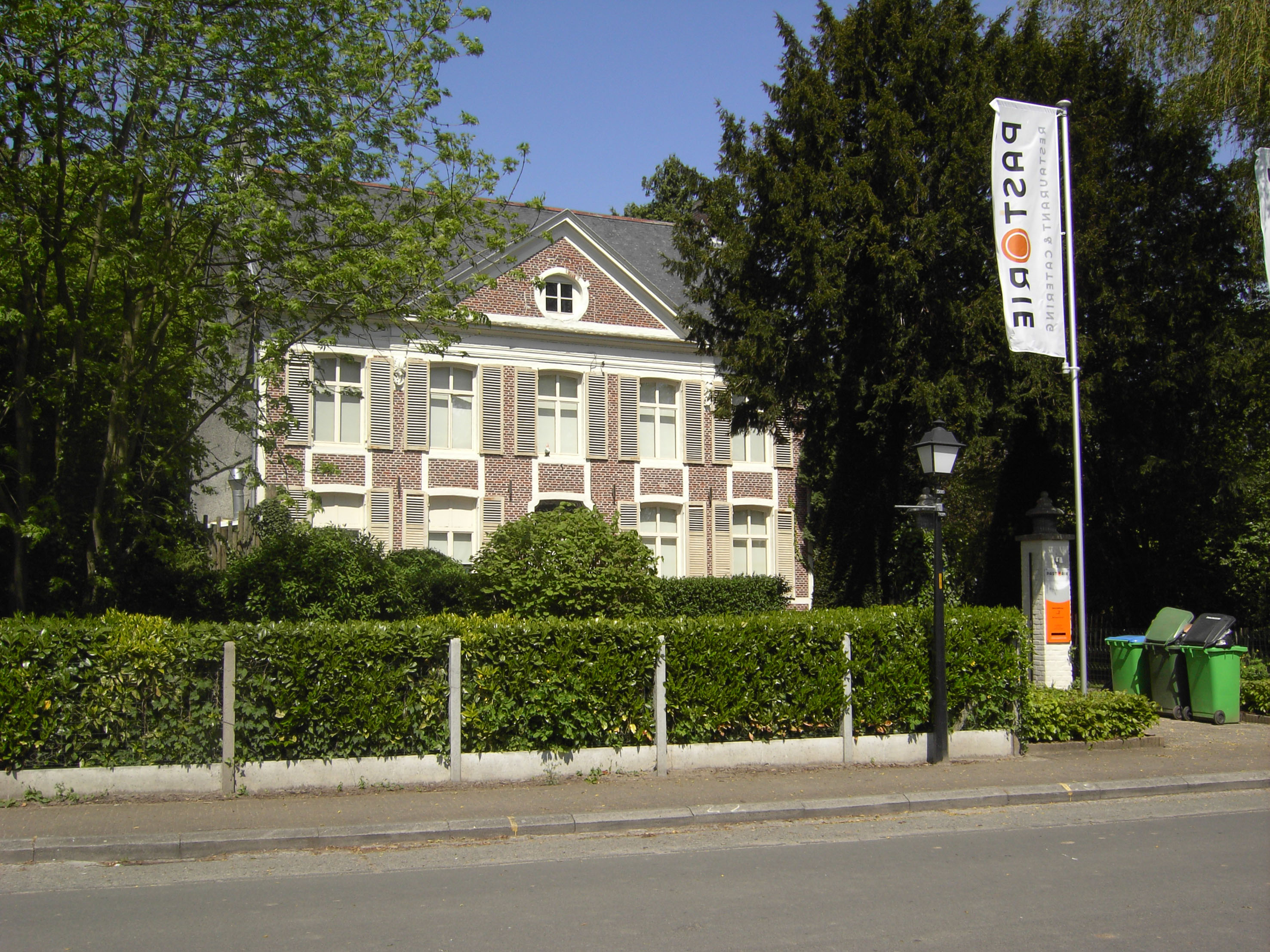 Zevergem - De Pinte - Pastorie (nu restaurant)